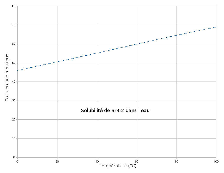 Solubilité de SrBr2 dans l'eau en fonction de la température.